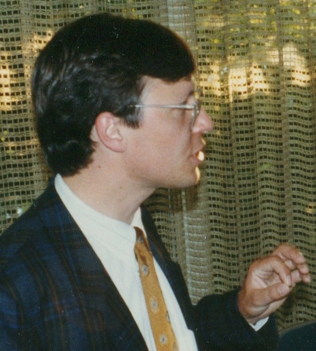 Volker Herres, Fernsehjournalist, Programmdirektor ARD